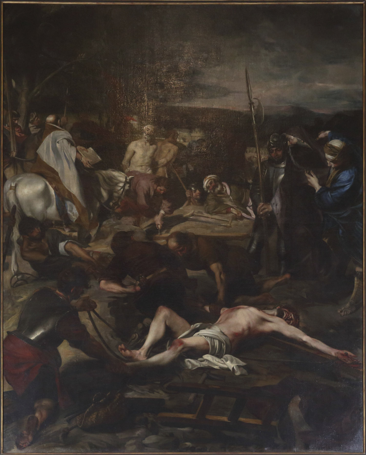 La Crucifixión, óleo sobre lienzo, Madrid, Capilla del Cristo de los Dolores de la VOT